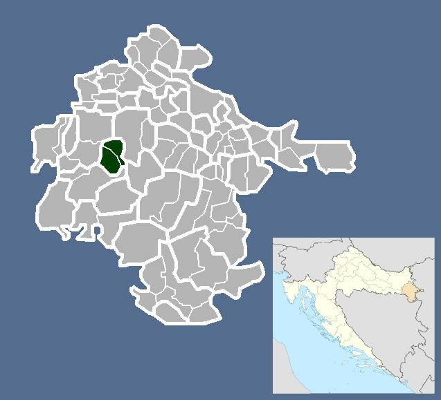 Српски (ћирилица): Општина Андријашевци.